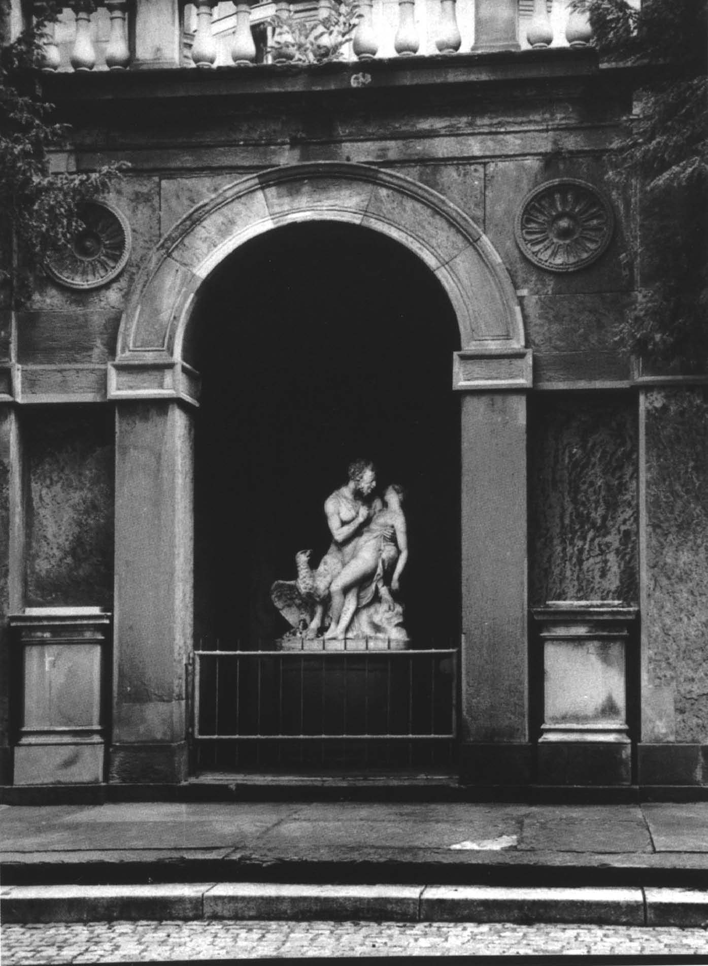 Francesco Pozzi (1779-1844): vollplastische Marmorgruppe auf ovaler Plinthe mit lateinischer Inschrift, Höhe 1,50 cm, bezeichnet auf Jupiters Gurt: „F Pozzi F. il 1828.“ (Fecit Pozzi Francesco il 1828 = geschaffen von Francesco Pozzi im Jahr 1828), Entstehungsjahr 1828, ursprünglich: Stuttgart, Villa Berg, in der Grotte der Westfassade, 2010: vom Südwestdeutschen Rundfunk in einer Auktion bei Nagel Auktionen für 50.000 € versteigert. Der Göttervater Jupiter, an dessen Seite sein Wappentier, ein mächtiger Adler mit den göttlichen Blitzen zwischen den Krallen sitzt, gab sich die Gestalt eines wollüstigen Satyrs, mit Bocksfüßen und –hörnern, nackt bis auf die Löwenhaut, die in seinem Schultergurt steckt, um Antiope, die schöne Tochter des Königs Nykteus, im Schlaf zu überfallen und zu verführen. Die üppige, schlaftrunkene Schöne, deren Scham nur dürftig ein Tuch bedeckt, lässt den Arm mit der Panflöte ohnmächtig hinabsinken, den anderen Arm legt sie um den Liebhaber, der sie mit seinen Bocksbeinen umschließt und gestikulierend auf sie einredet. Inschrift auf der Stirnseite der Plinthe: „Jupiter Antiopen vidit titanida et o si / nupta miiii fuerat jampridem pella quiessent / terrigenum dixit vecops mox foedere pacto // in venerem putret placitoque indulget amori / at dum complexus et basta miscet inermum / irruit hunc titan scopuloque infixit acuto.“ (Lesung einiger Buchstaben unsicher).